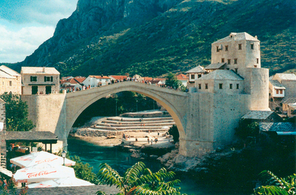 Stari Most